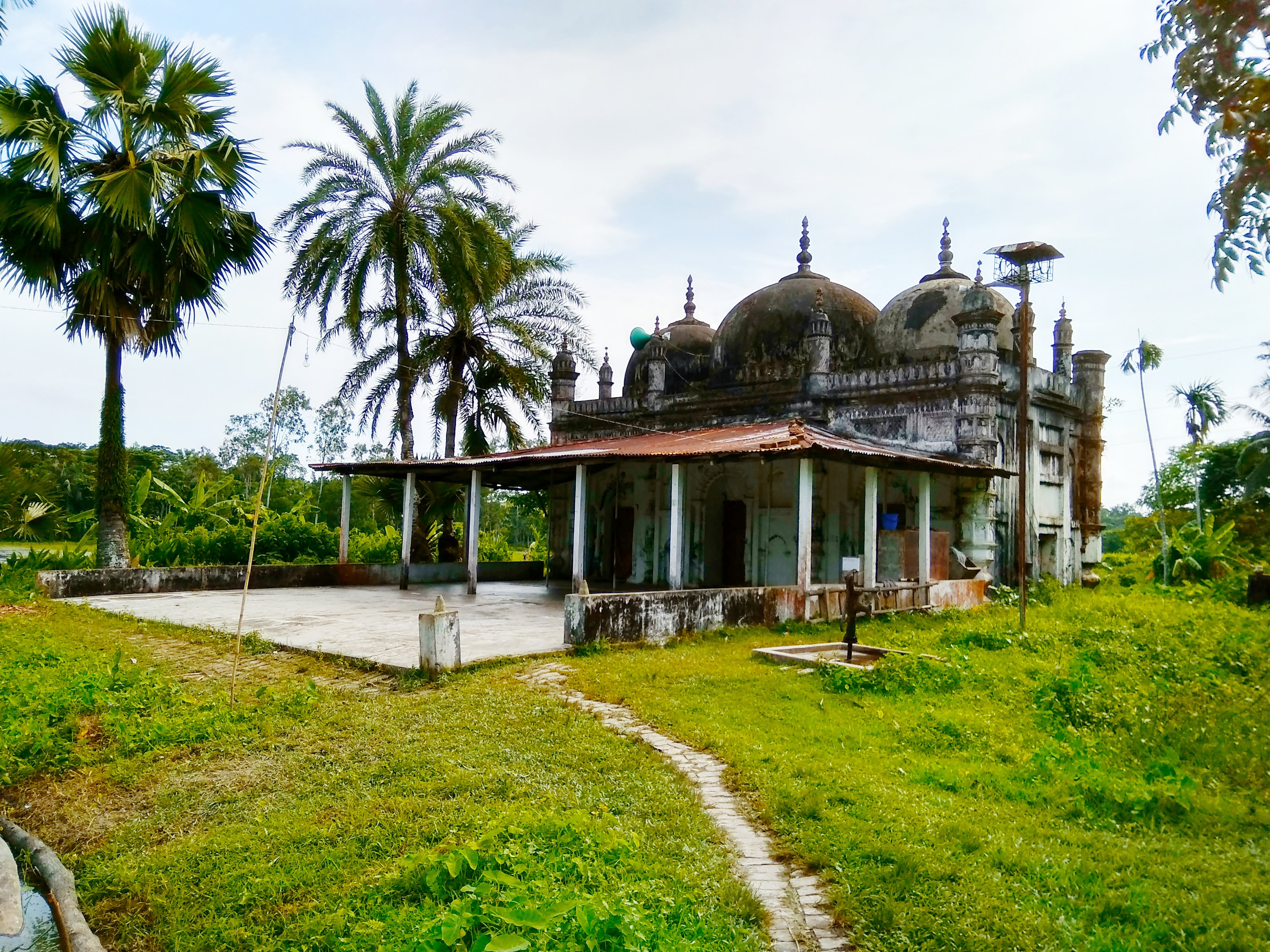 দূর থেকে রমজান মিয়া জামে মসজিদ এর সম্পূর্ণ দৃশ্য।